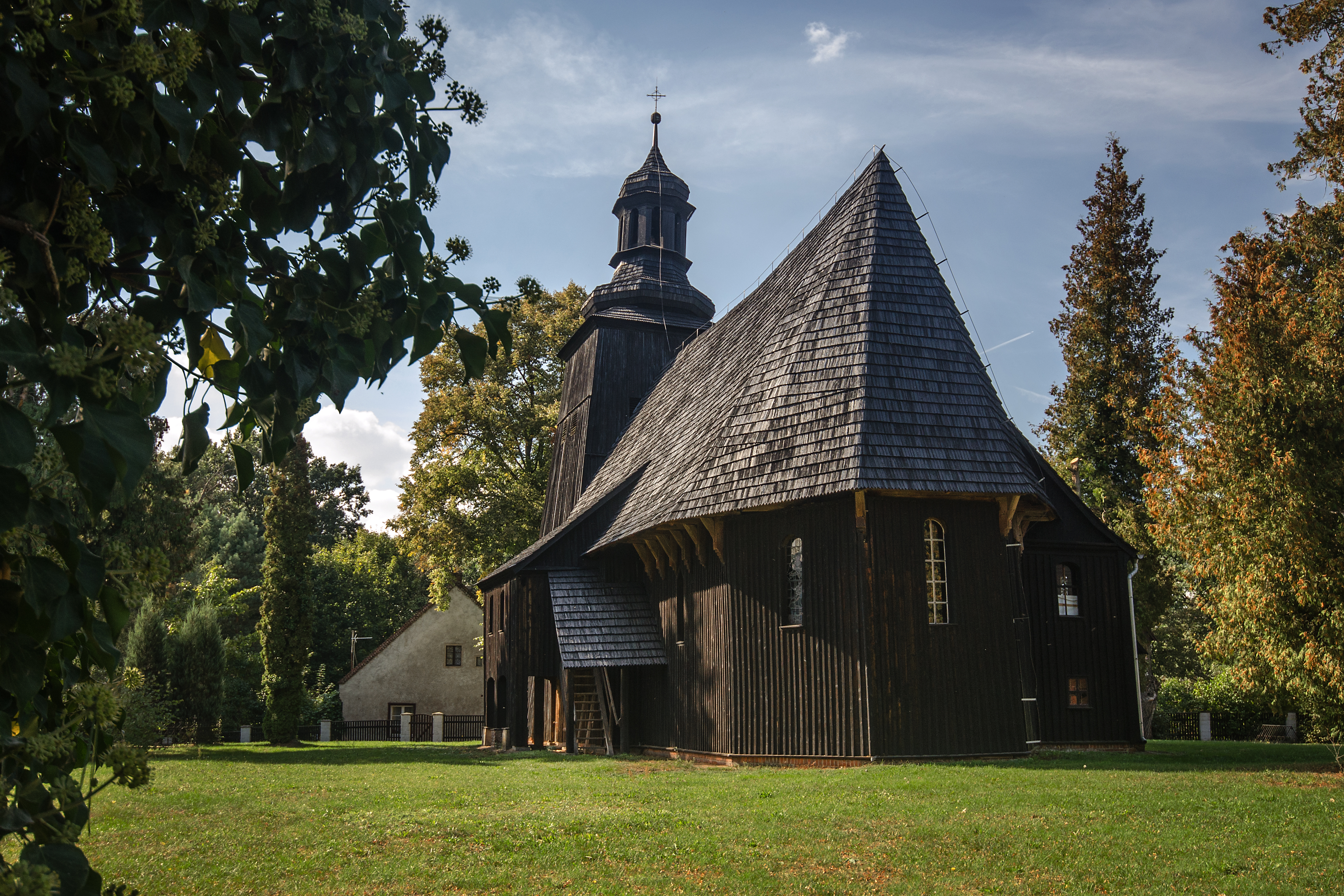 Proślice, kościół ewangelicki, ob. rzym.-kat. fil. p.w. Najśw. Serca Jezusowego, 1580, 1773